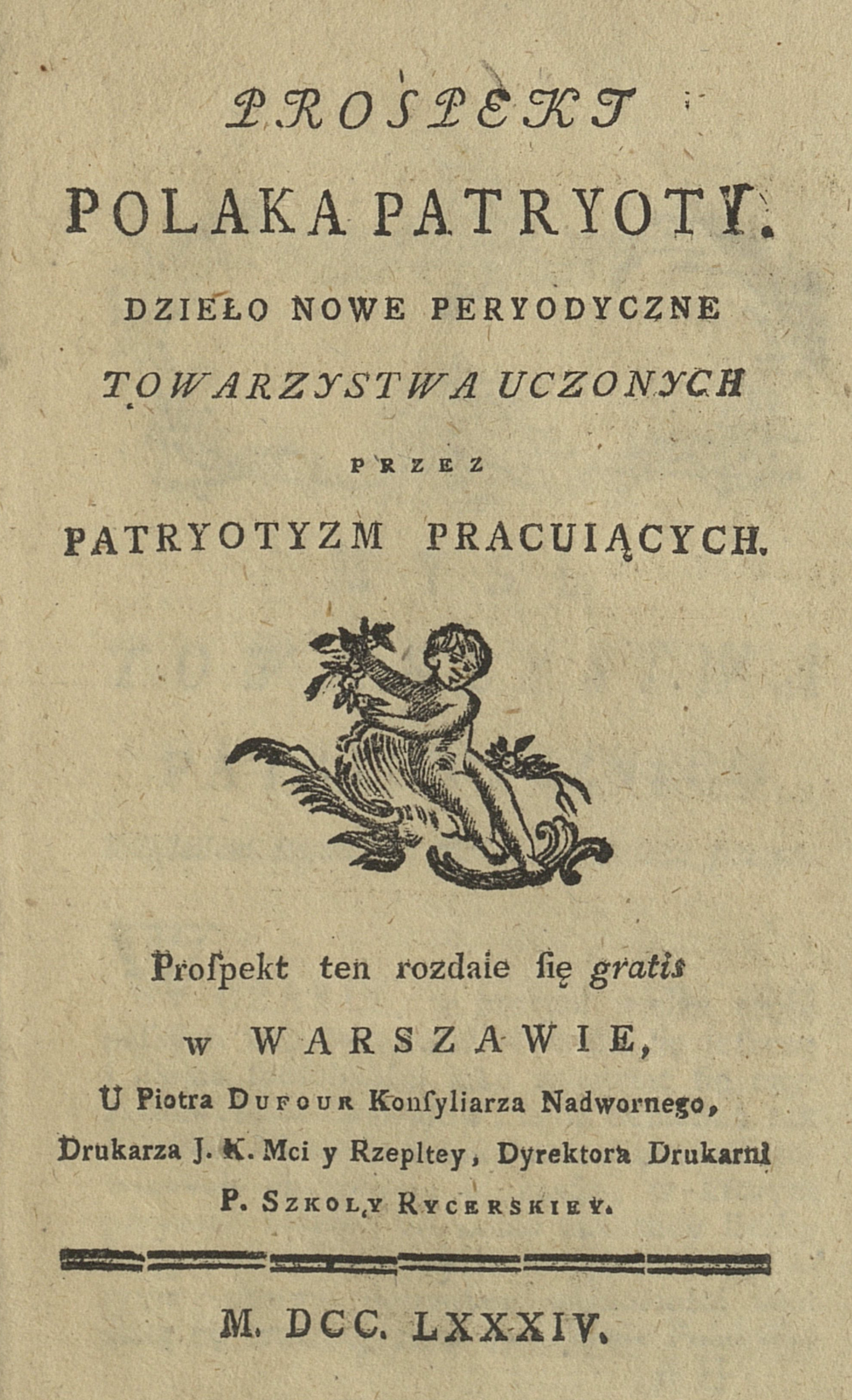 1784 prospekt polaka patryoty